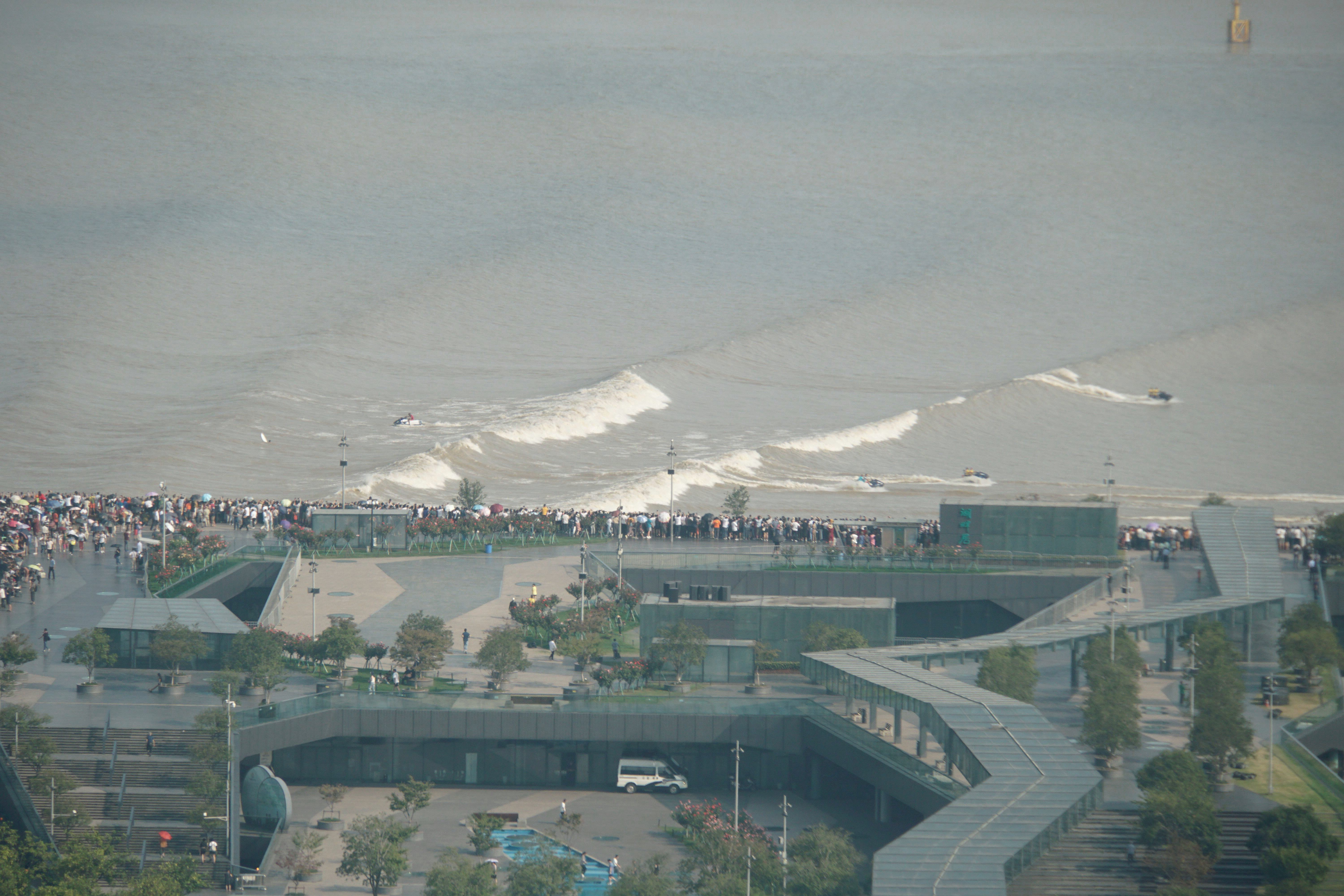 2019年9月16日，农历八月十八，钱江潮通过城市阳台